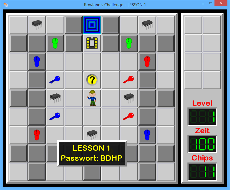 Rowland’s Challenge ist eine originalgetreue Neufassung des Spiels Chip’s Challenge und wurde in Visual Studio C++ programmiert. Die verwendeten Texturen sind dem Originalspiel angelehnt und wurden mit Inkscape erstellt.